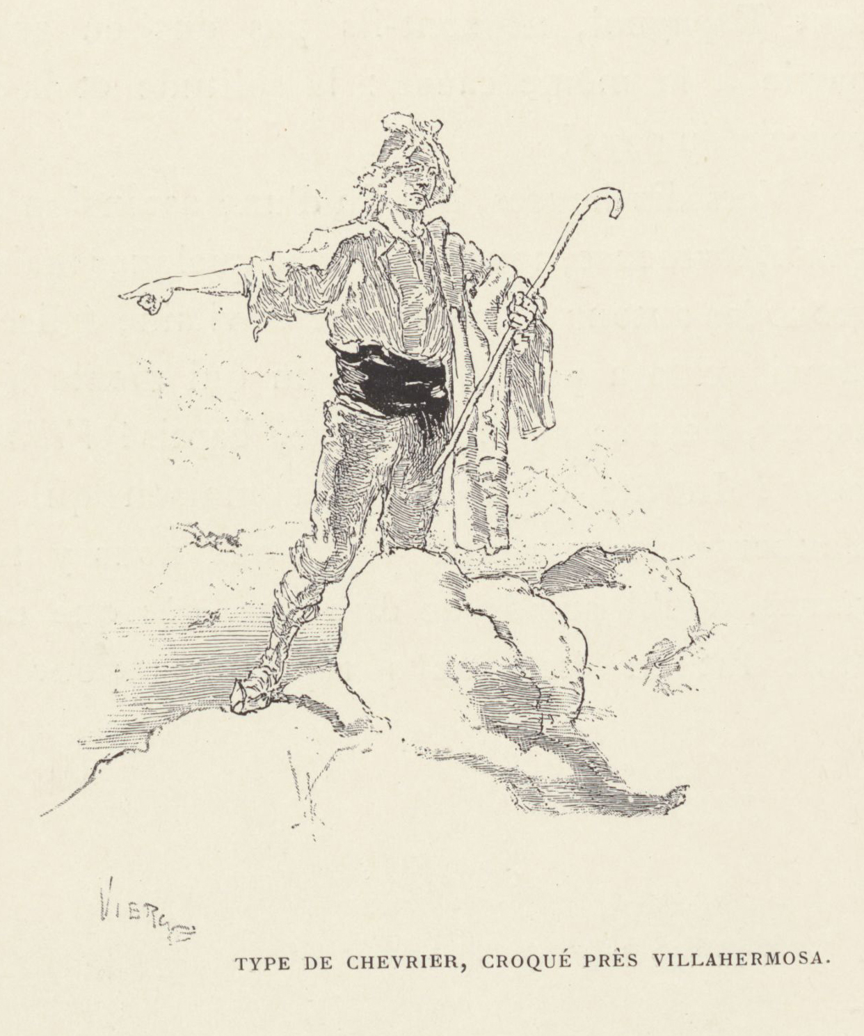 Type de chevrier, croqué près Villahermosa.